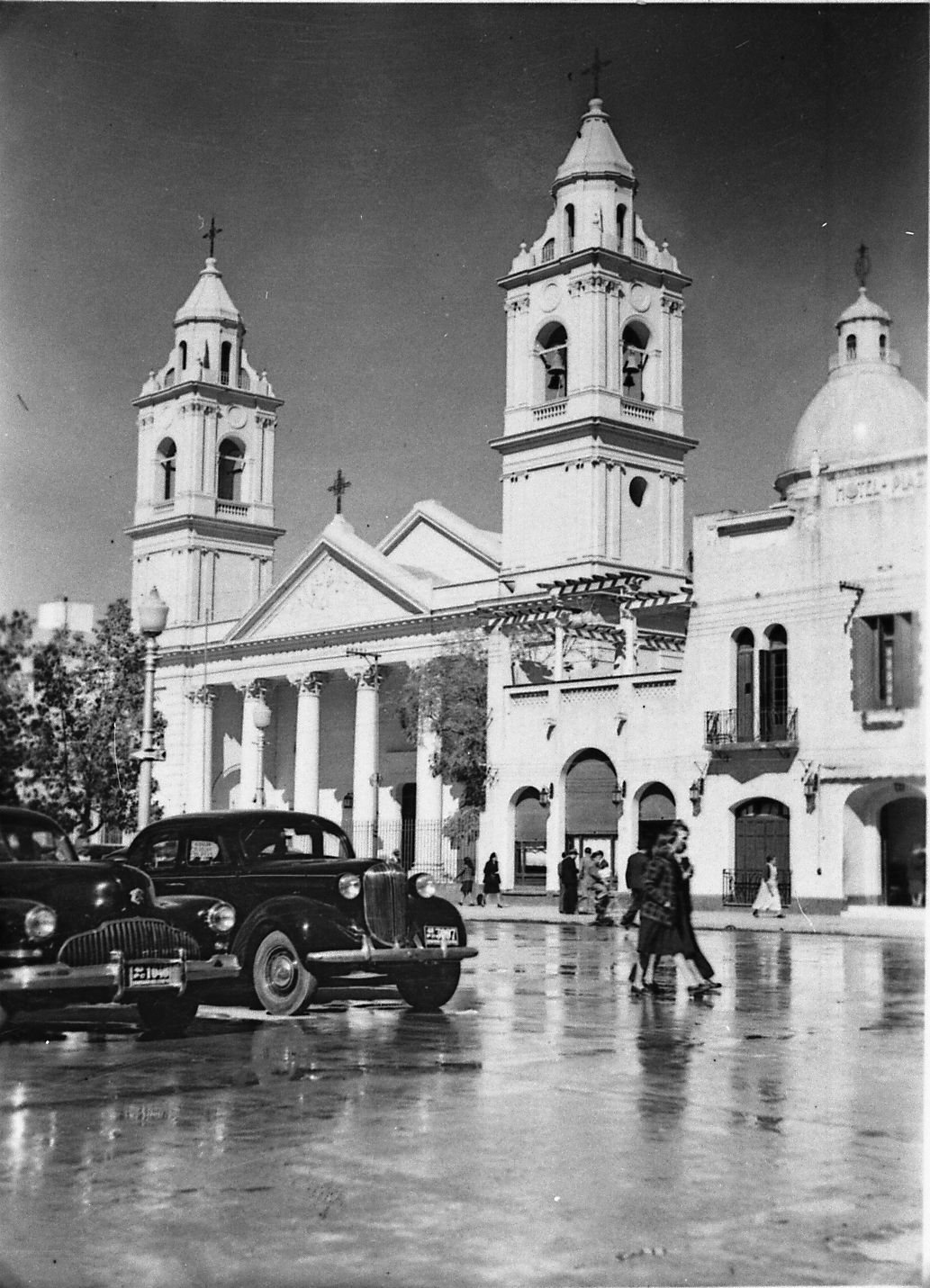 Es la Quinta edificación, la cual fue inaugurada el 13 de Enero de 1877. Las obras fueron realizadas por Agustín y Nicolás Cánepa por orden del Gobernador Don Manuel Taboada. Fue declarada Monumento Histórico Nacional por Decreto Nº 13723 del 28 de Julio de 1953.